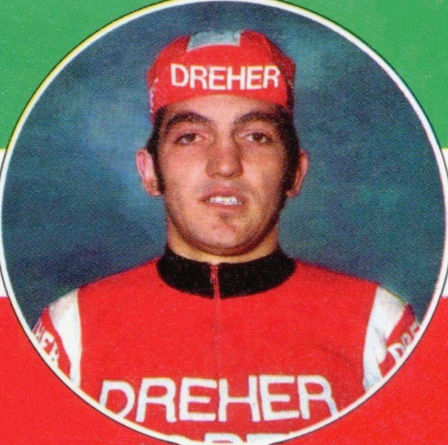 SPRINT '73 - PANINI - Figurina-Sticker n. 269 - FRANCO ONGARATO - ITA -Rec